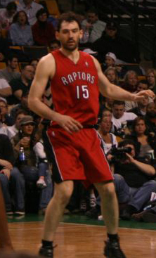 Jorge Garbajosa, cropped